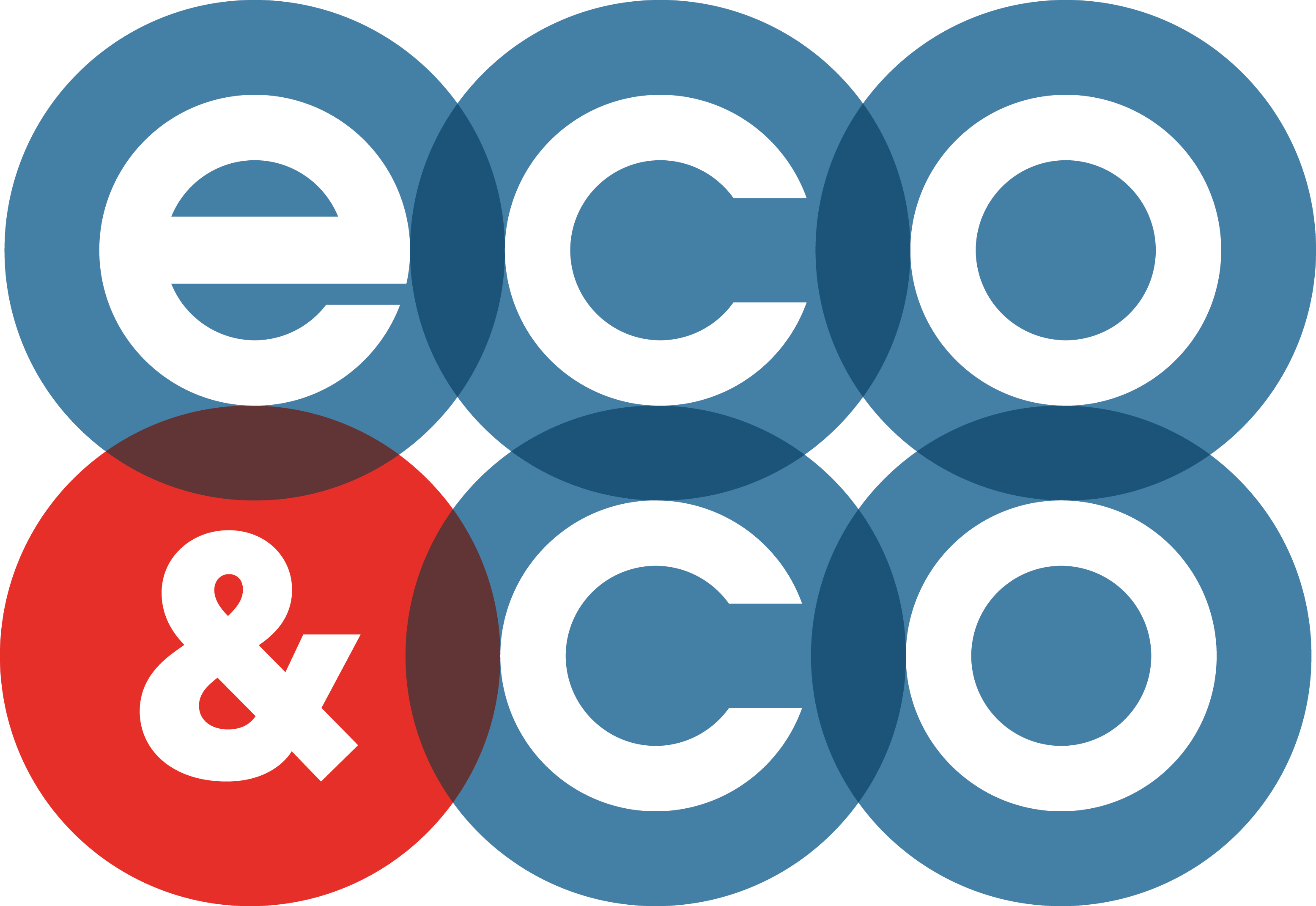 logo de l'émission Eco&co de Wwéo